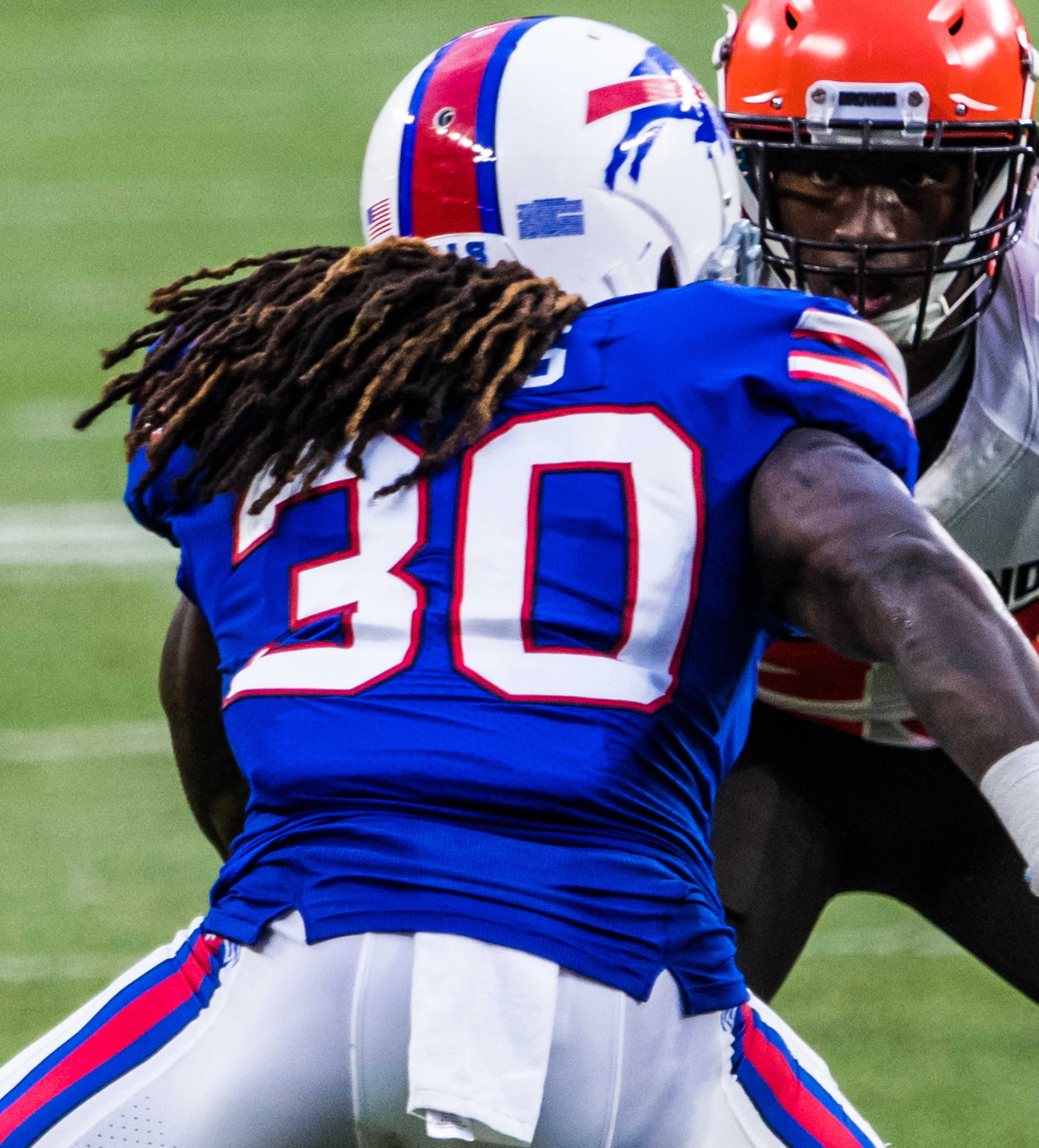 Damarious Randall